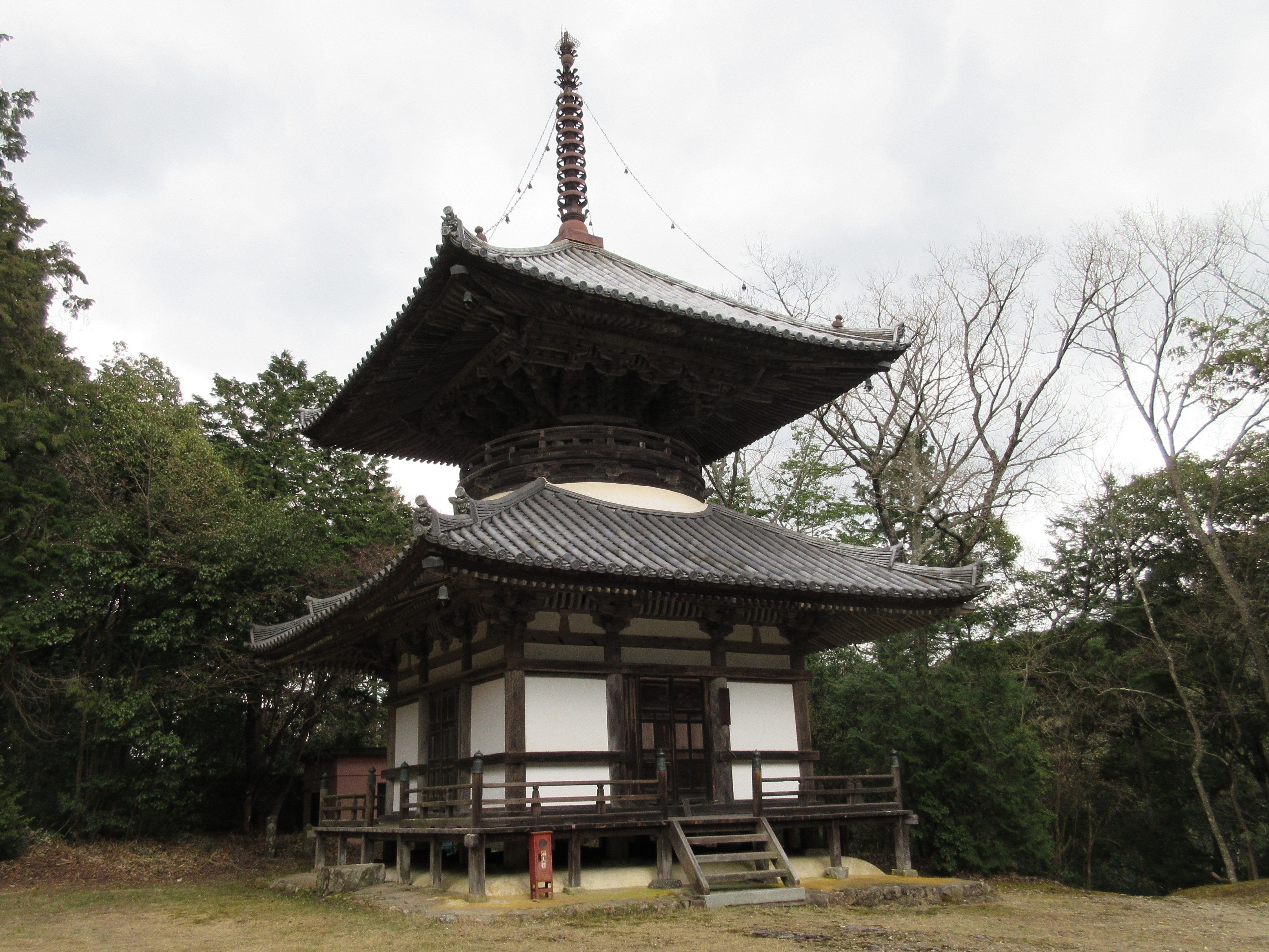 朝光寺多宝塔